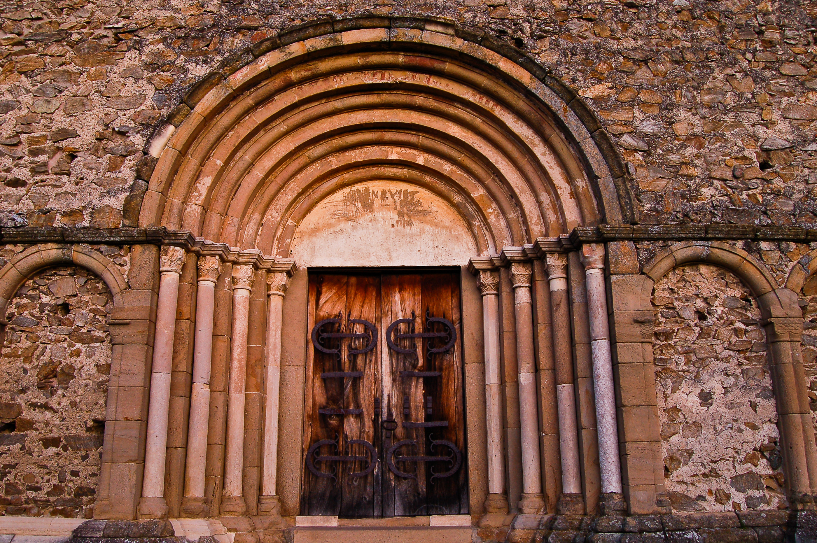 vedere poarat bisericii cisnadioara 01